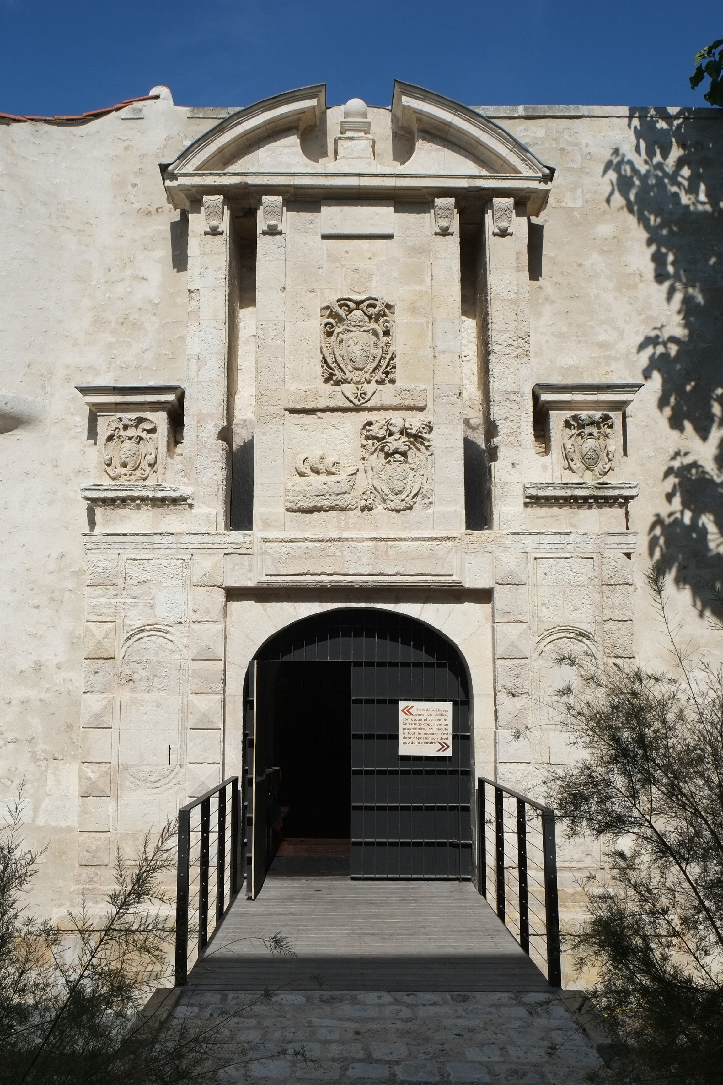 Porte Maubec (côté extérieur) La Rochelle Charente-Maritime France